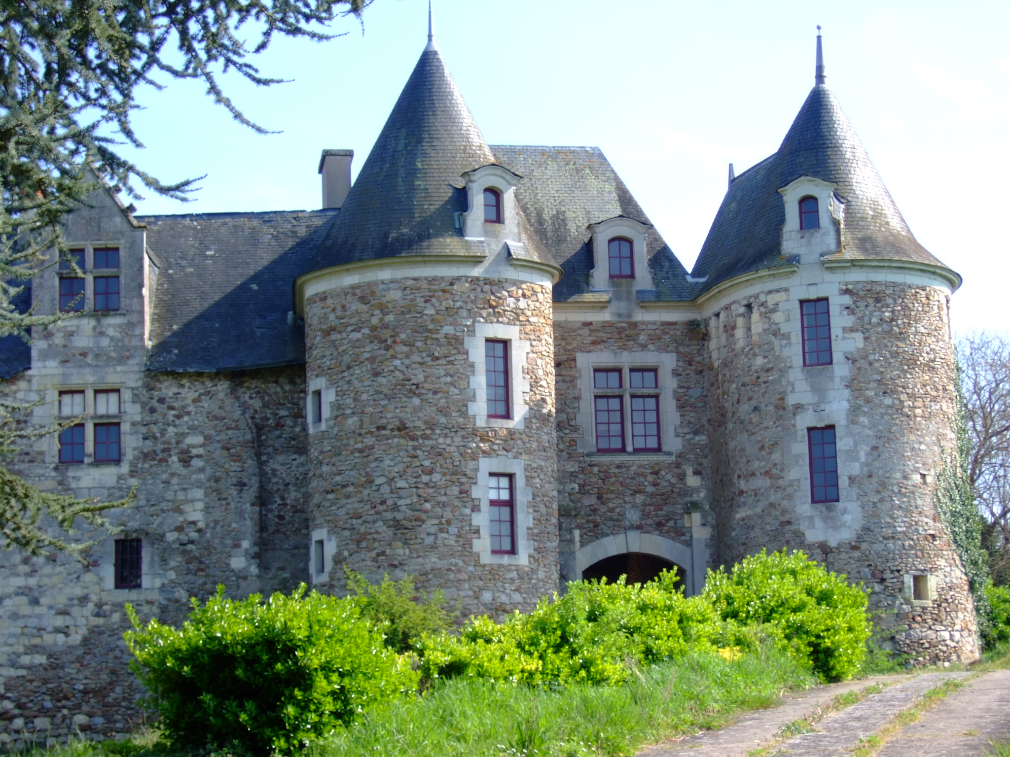 Le château de Blaison